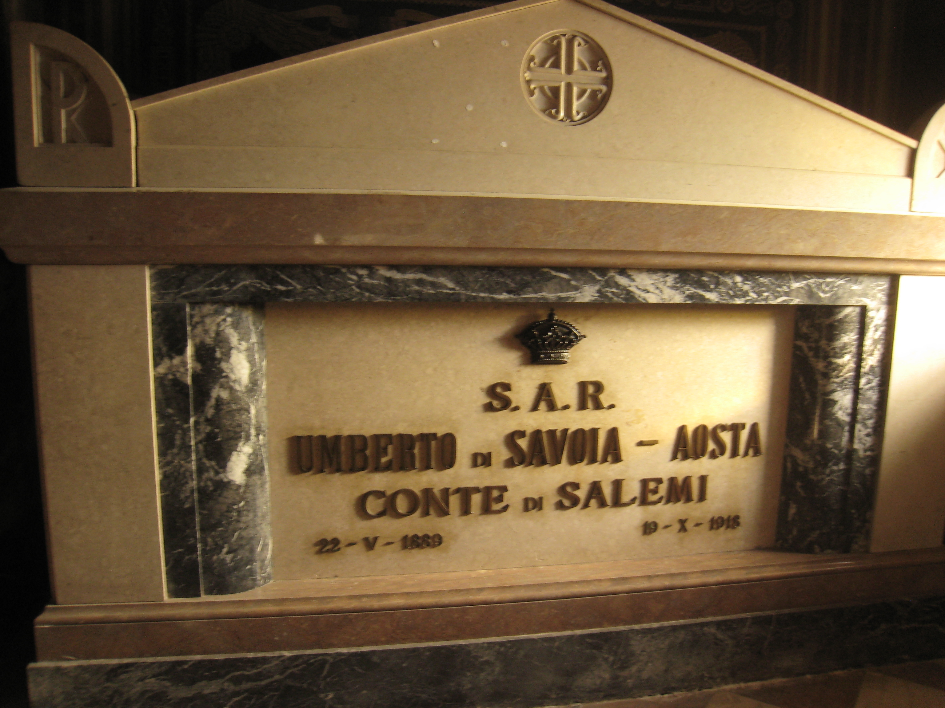 Sepolcro di S.A.R. Umberto di Savoia-Aosta Conte di Salemi (1889-1918). Sacrario di Bassano del Grappa.